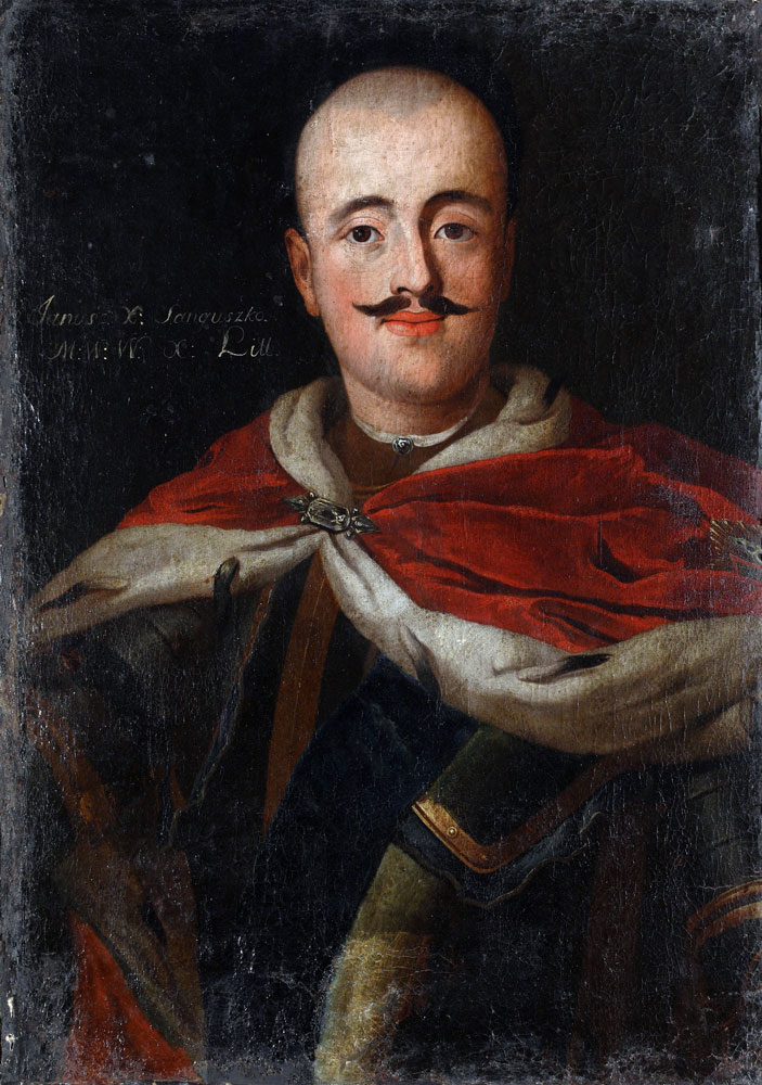 Беларуская (тарашкевіца): Партрэт князя Януша Аляксандра Сангушкі (Januš Alaksandar Sanguška).